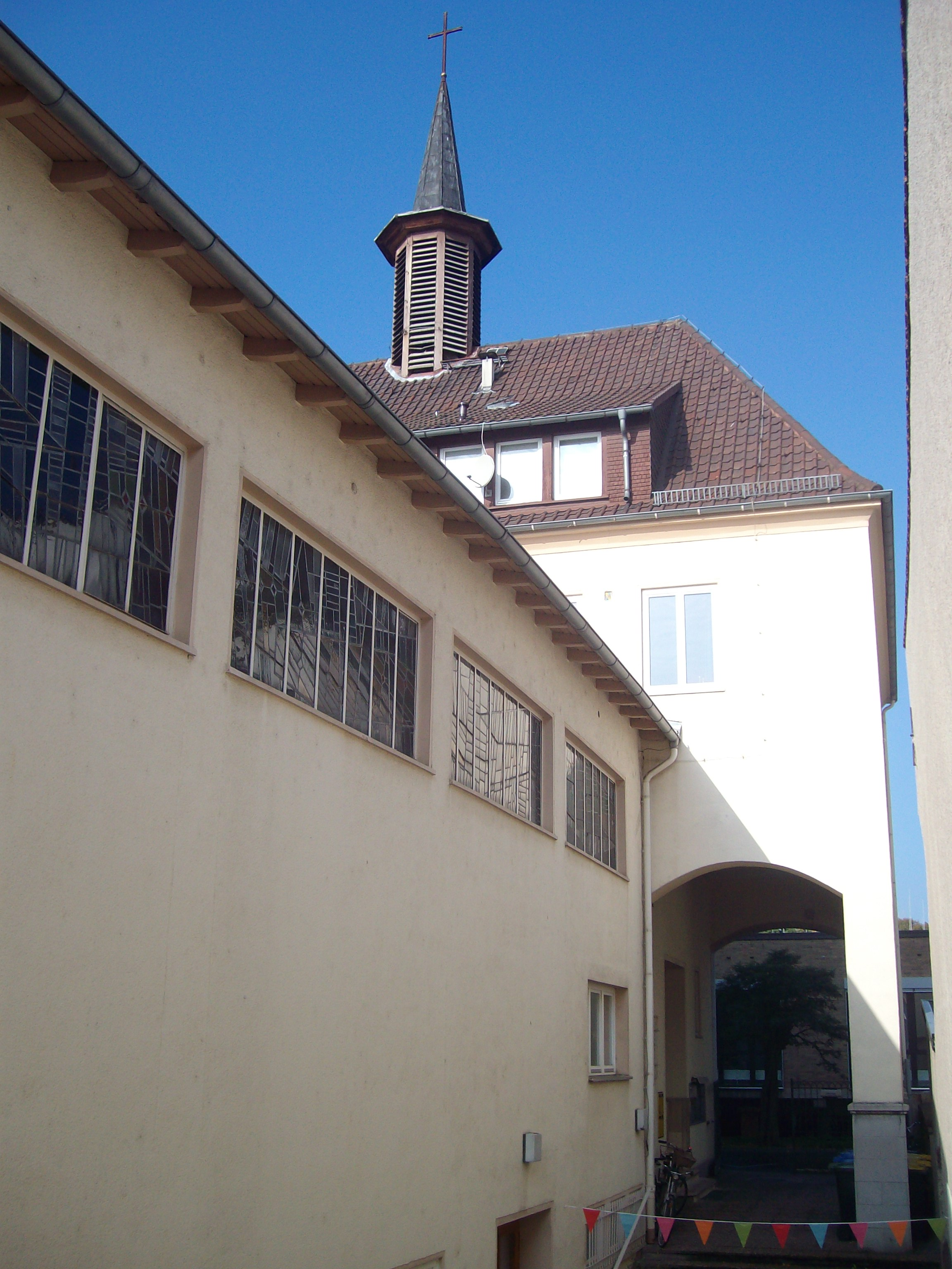 Lukaskirche, Gießen, Hessen, Deutschland